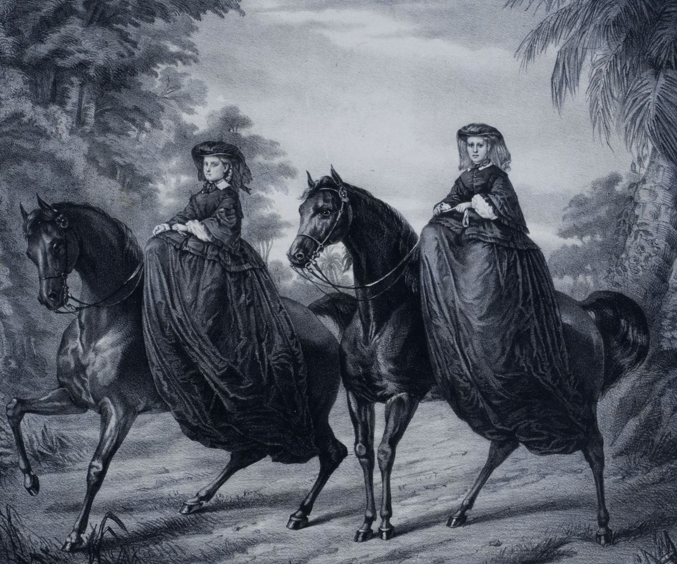 Litografia em preto e branco